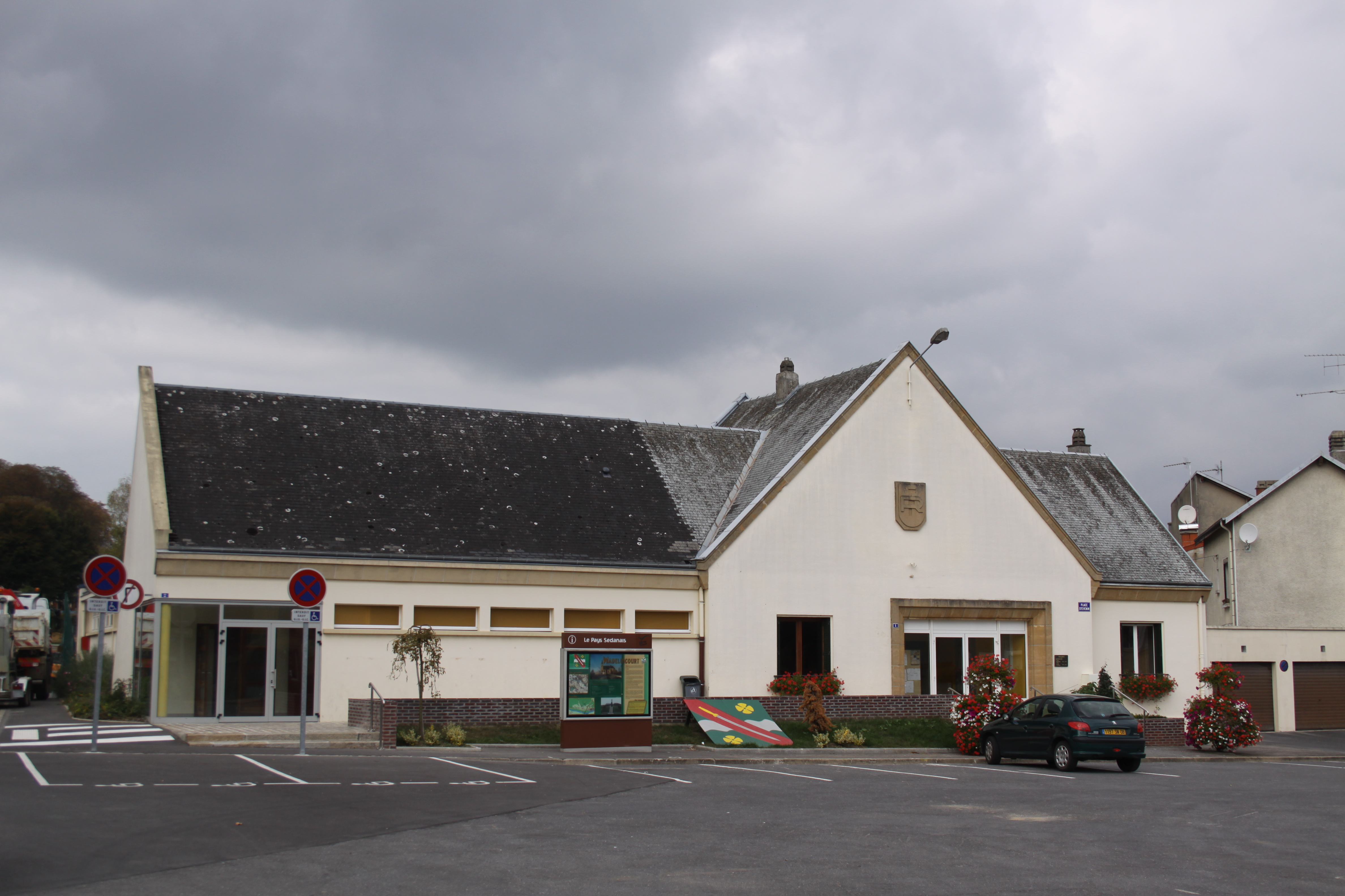 Village Ardennais